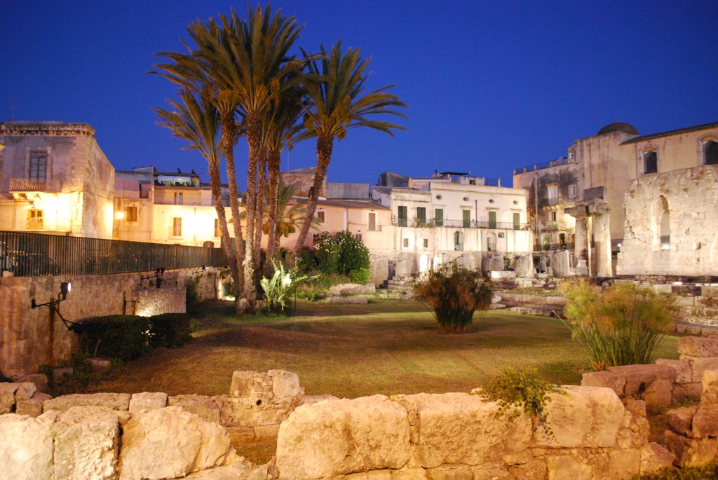 Palme al Tempio di Apollo - Siracusa - Sicilia